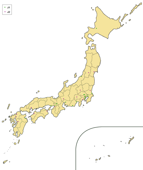 2008年のJリーグ参加クラブ分布図.